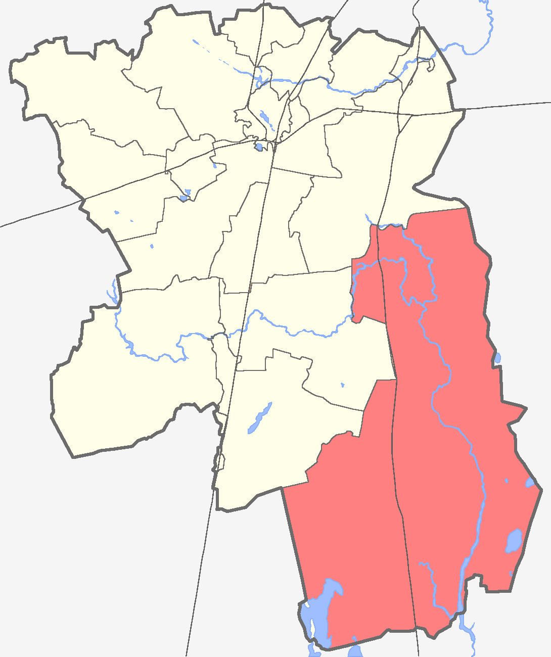 Вырицкое городское поселение на карте Гатчинского района